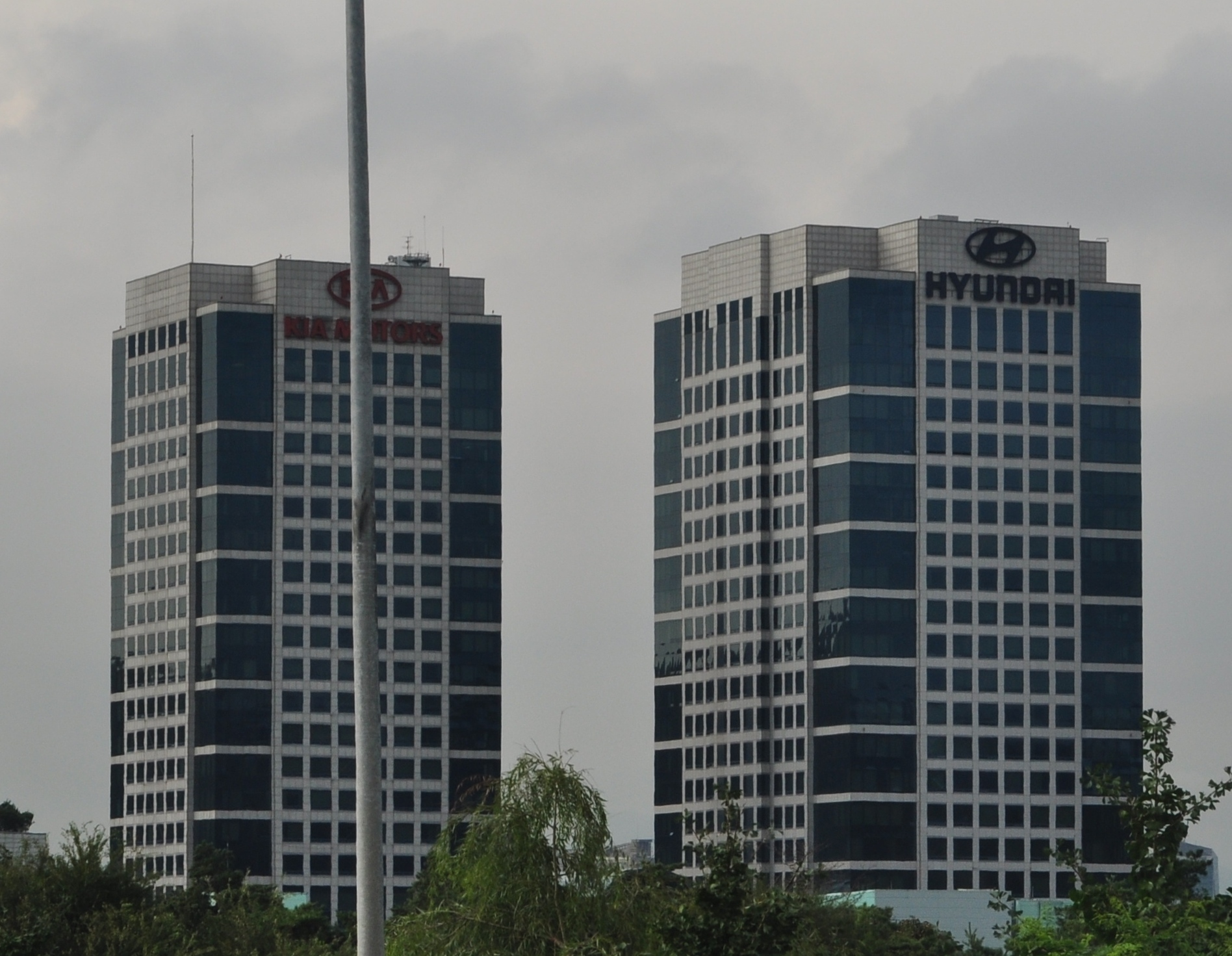 현대자동차 및 기아자동차 본사 사옥(서울 양재동)